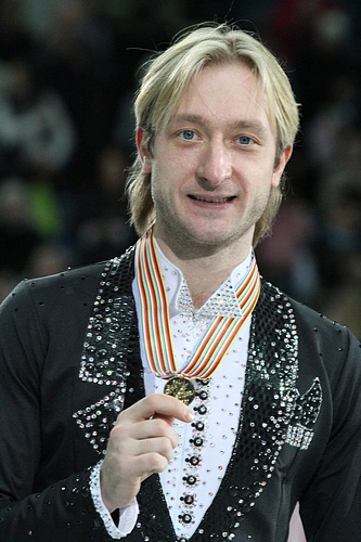 Евгкний Плющенко с золотой медалью чемпионата Европы по фигурному катанию 2012